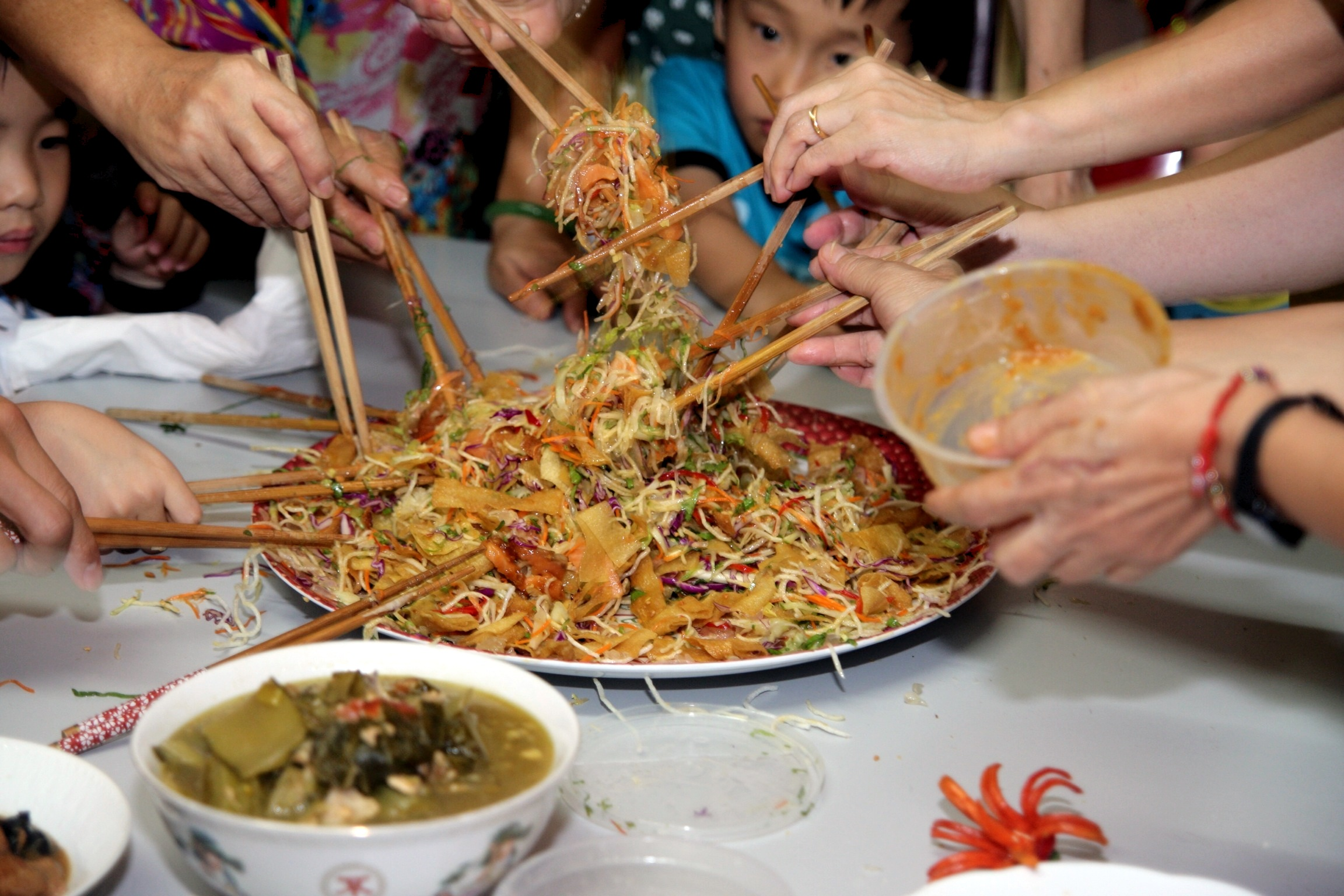 Lo Hei